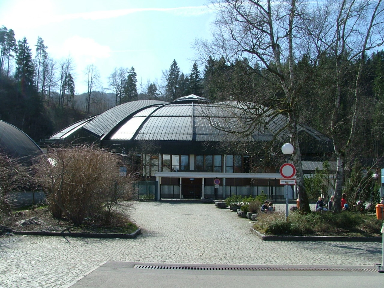 BLZ Bundesleistungszentrum für Eishockey